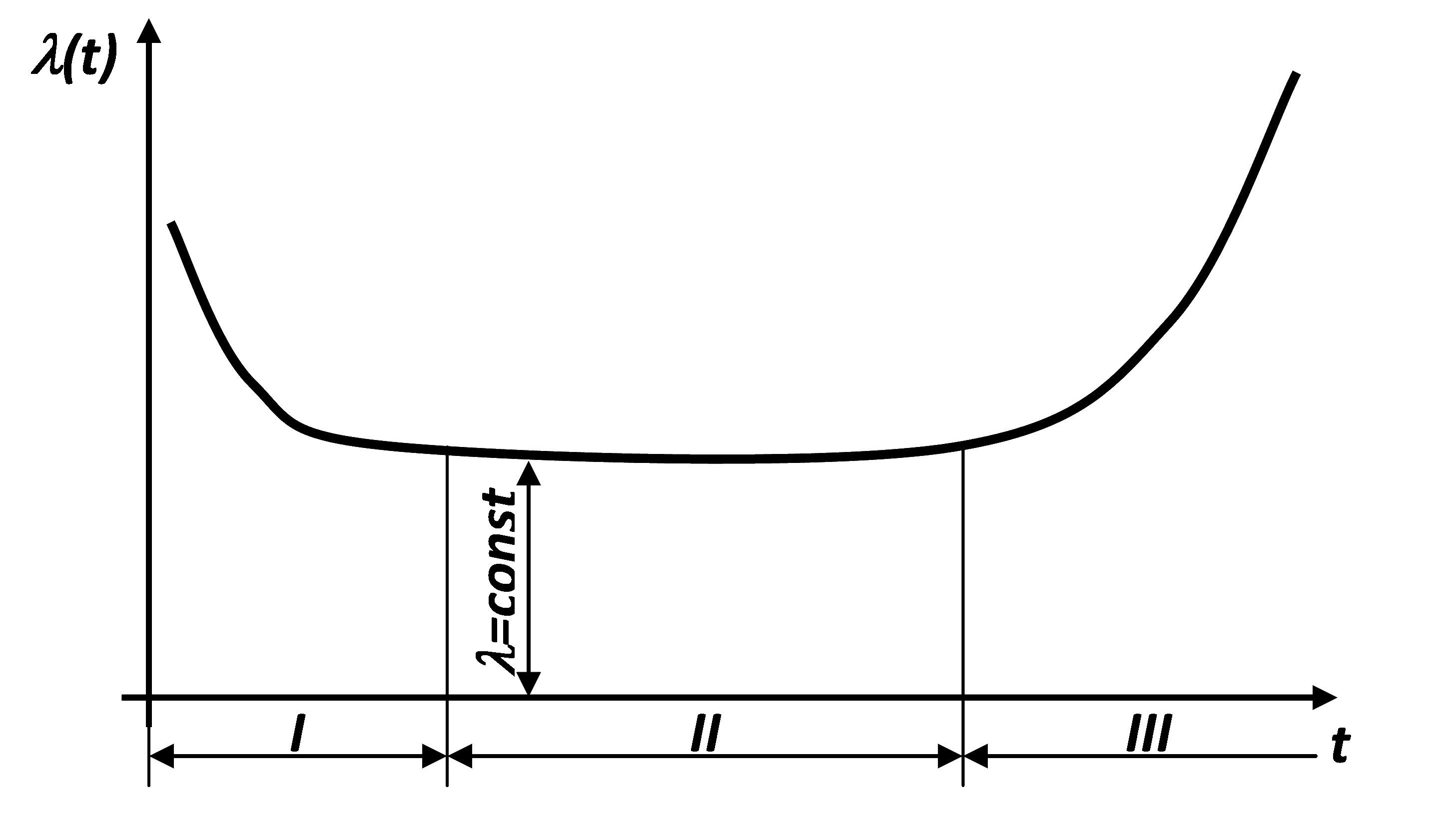 Зависимость интенсивности отказов от времени